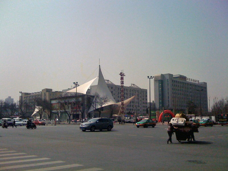 长安南路、长安中路与雁塔西路（纬二街）路口